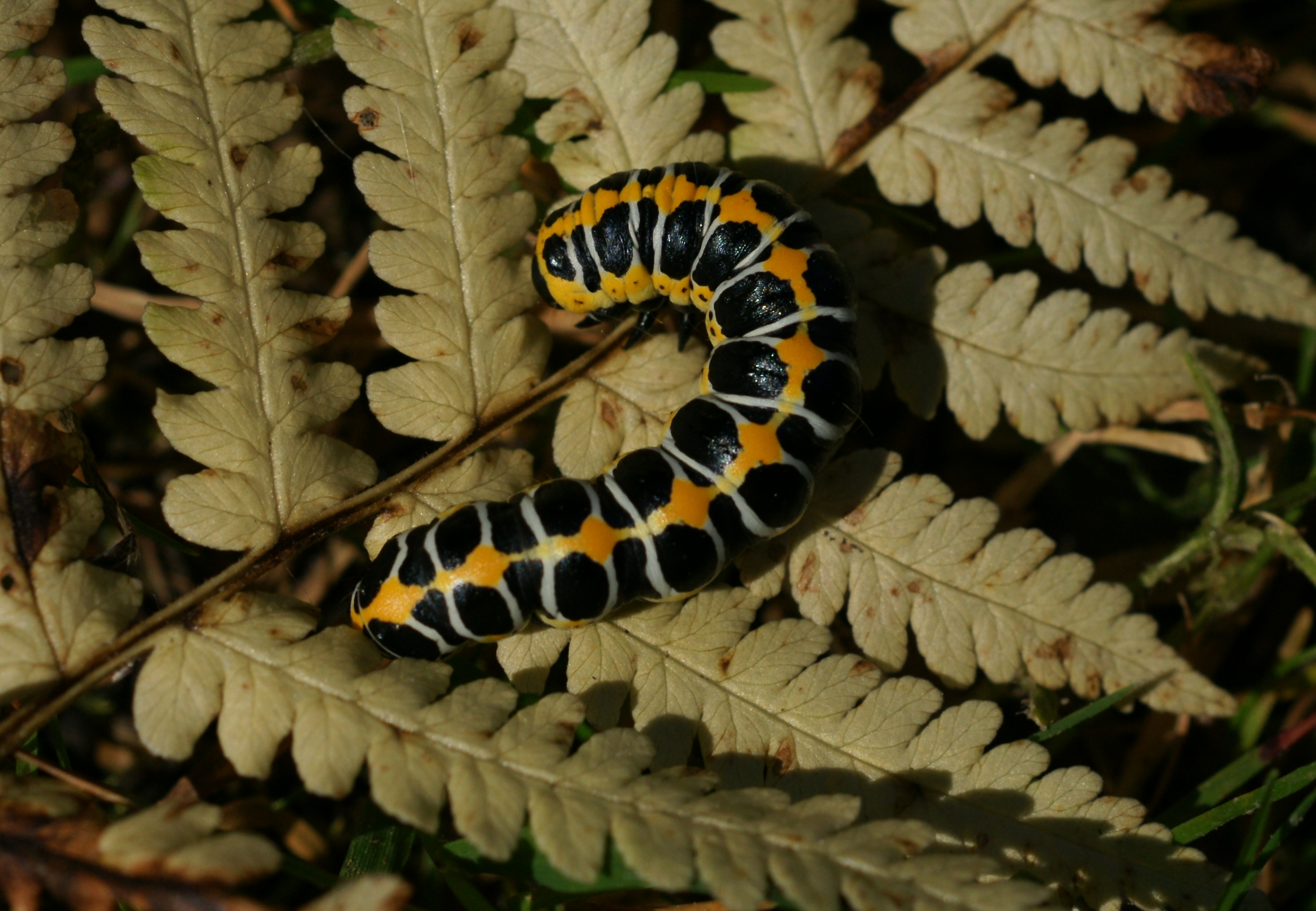 Lattich-Mönch Raupe Cucullia lactucae ([Denis & Schiffermüller], 1775) - gefunden im August auf ca. 1600m Seehöhe.